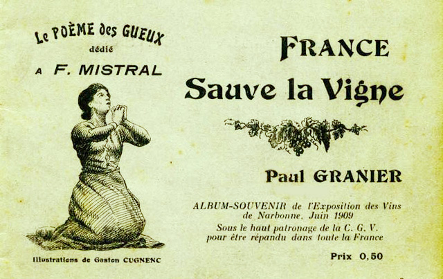 Le poème des gueux, "France sauve la vigne" dédié à Frédéric Mistral